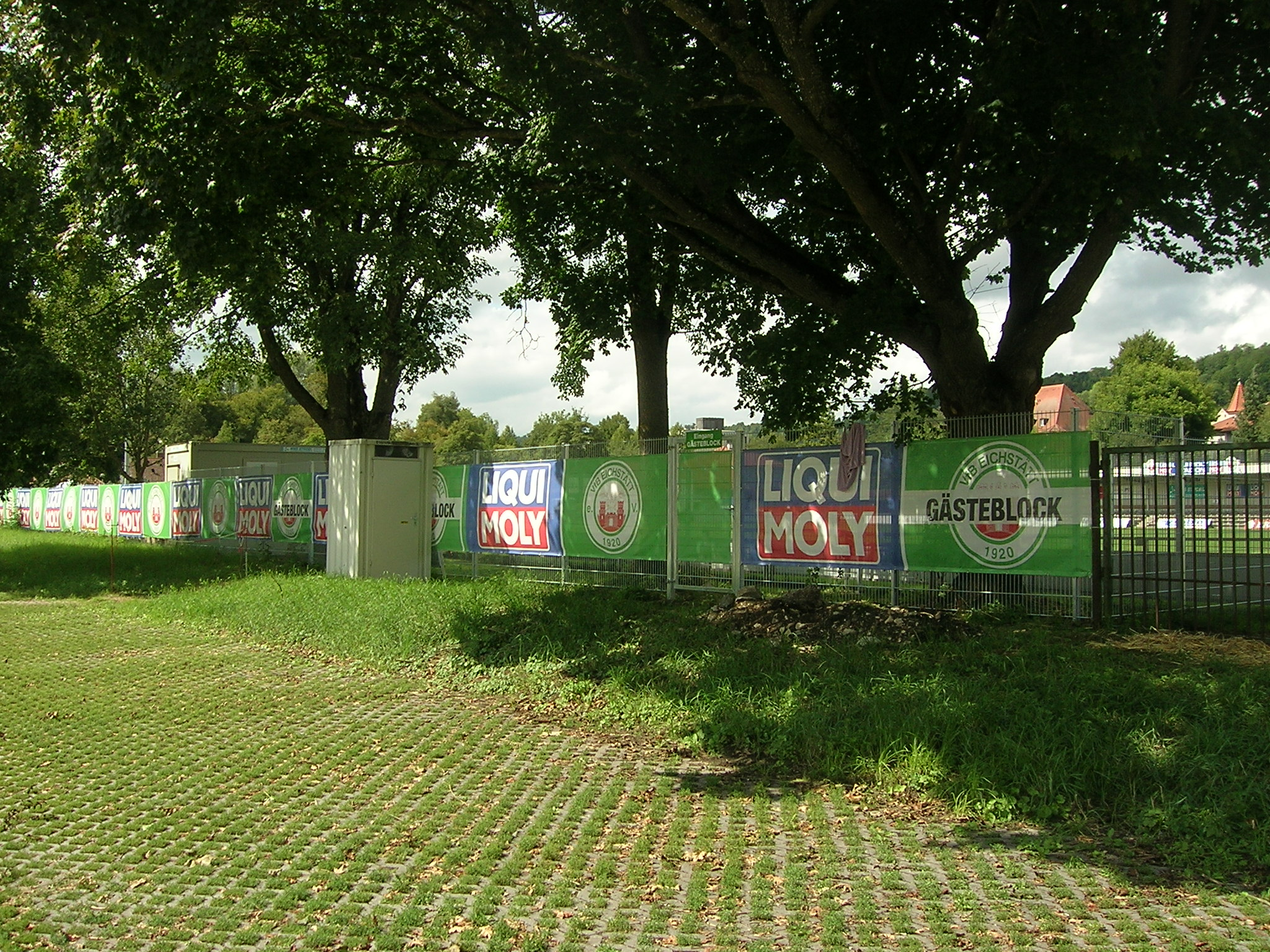 Stadion VfB Eichstätt 2017